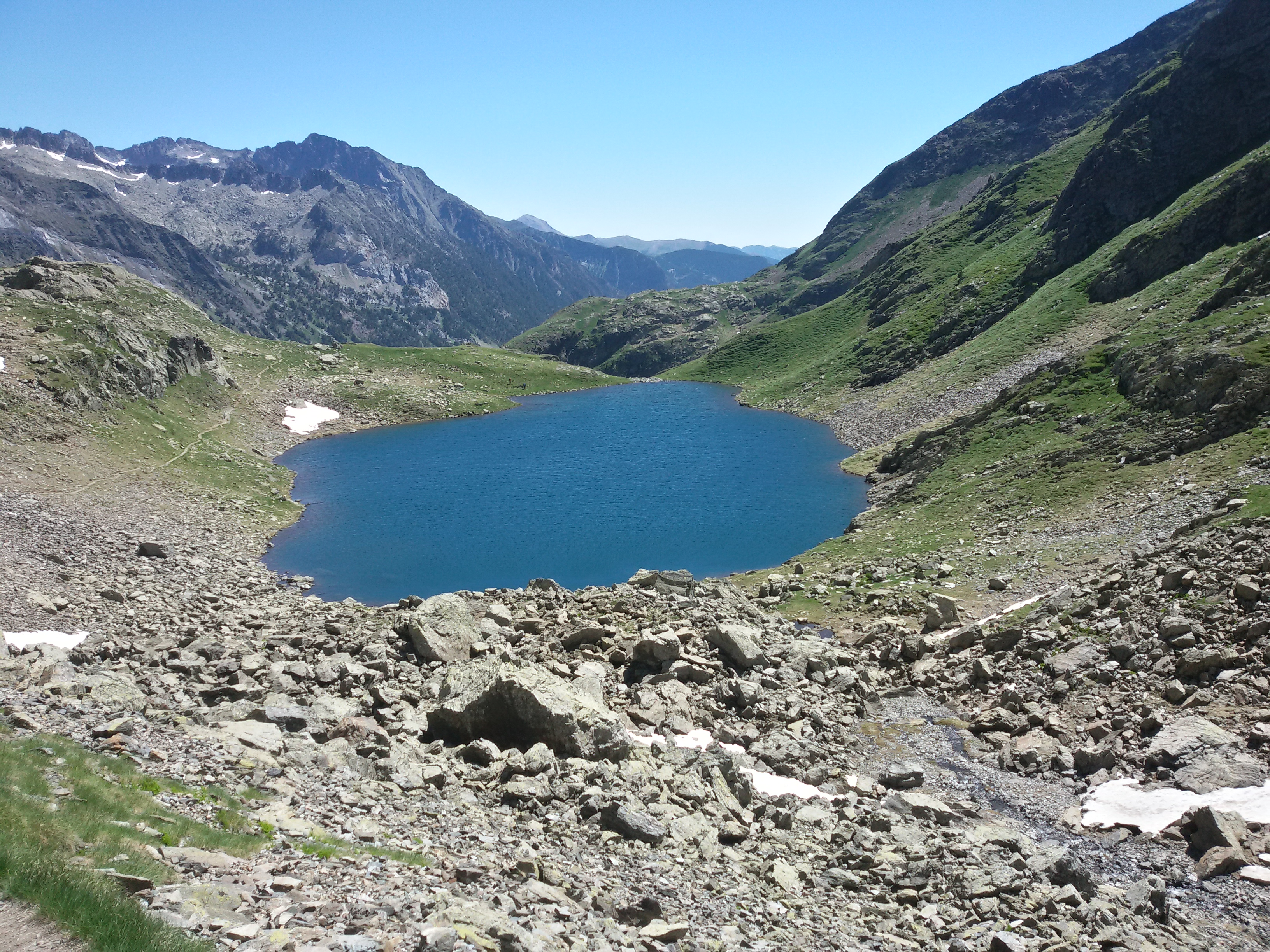 Ibón de Gorgutes